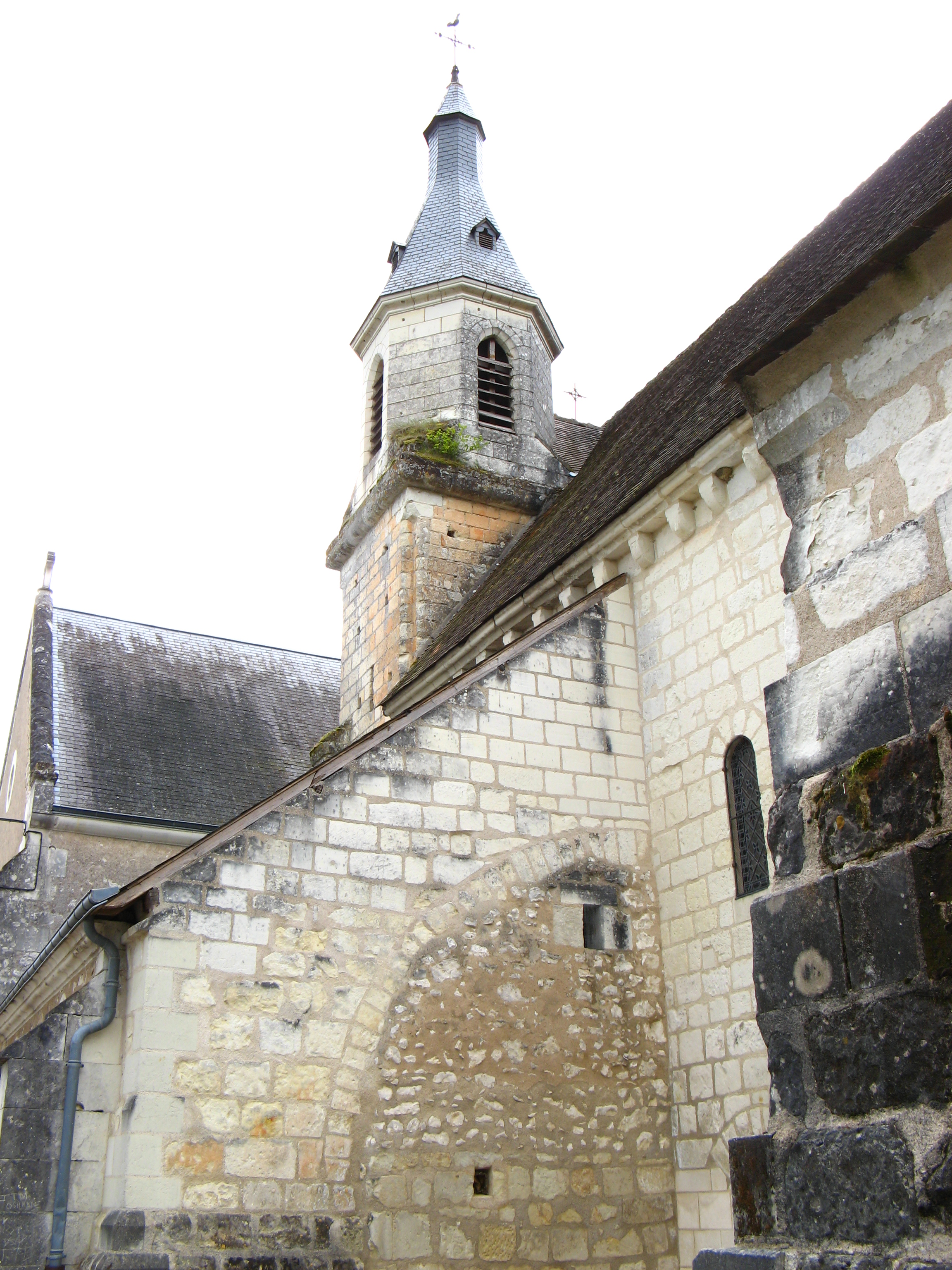 Eglise Notre dame de Lye